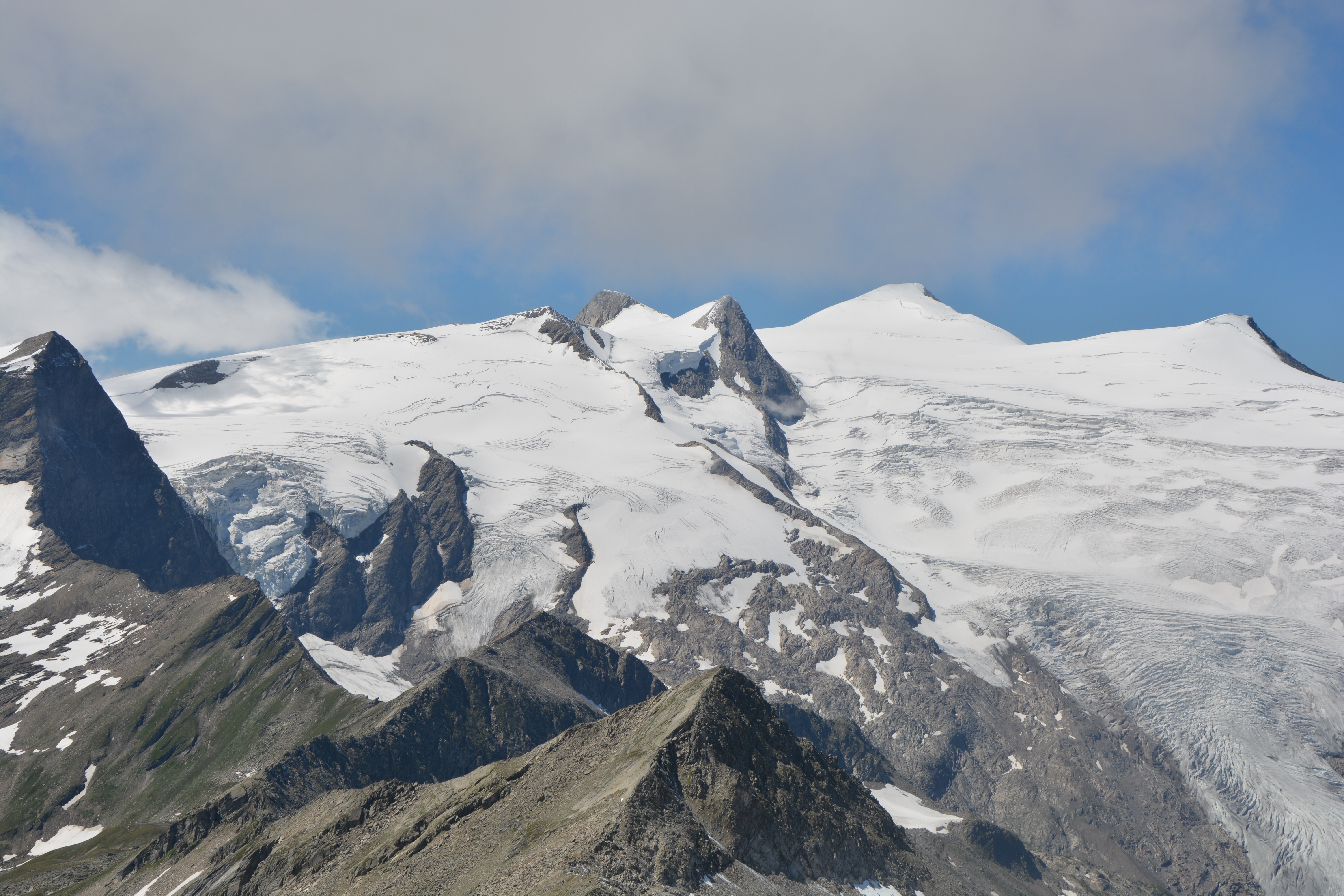 Venedigermassiv gesehen vom Wildenkogel. Im Vordergrund Innerer und Äußerer Knorrkogel.